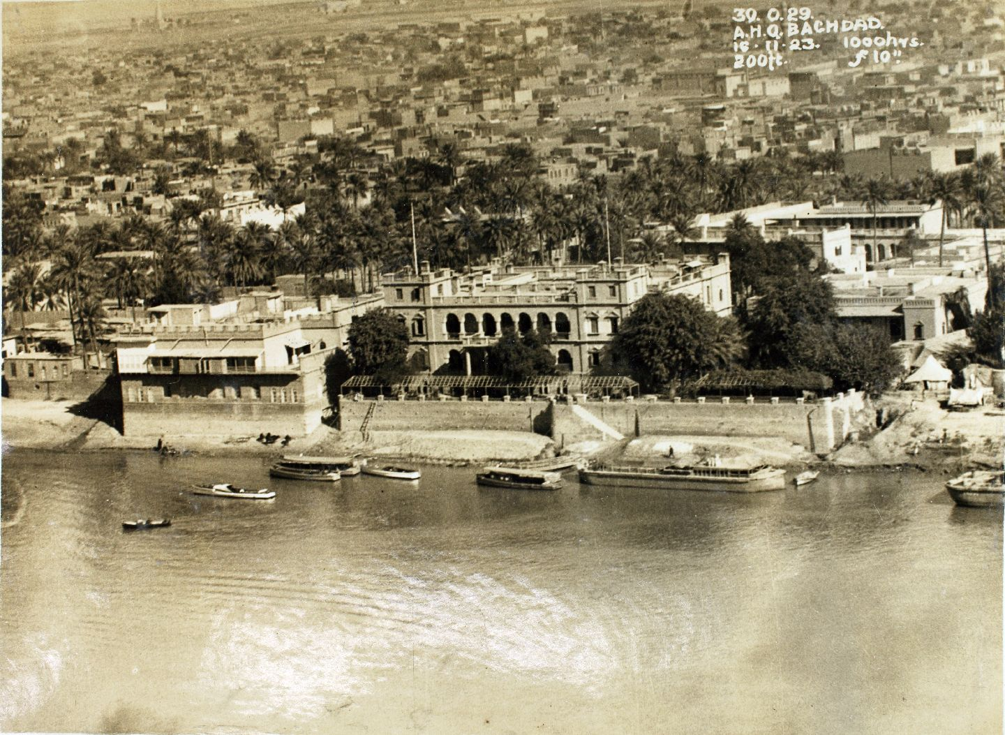 مشهد لضفاف نهر دجلة في بغداد عام 1923